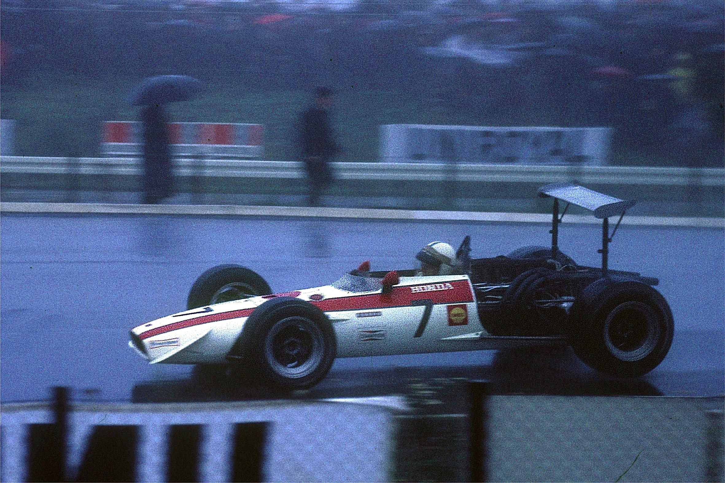 John Surtees im Honda RA 301